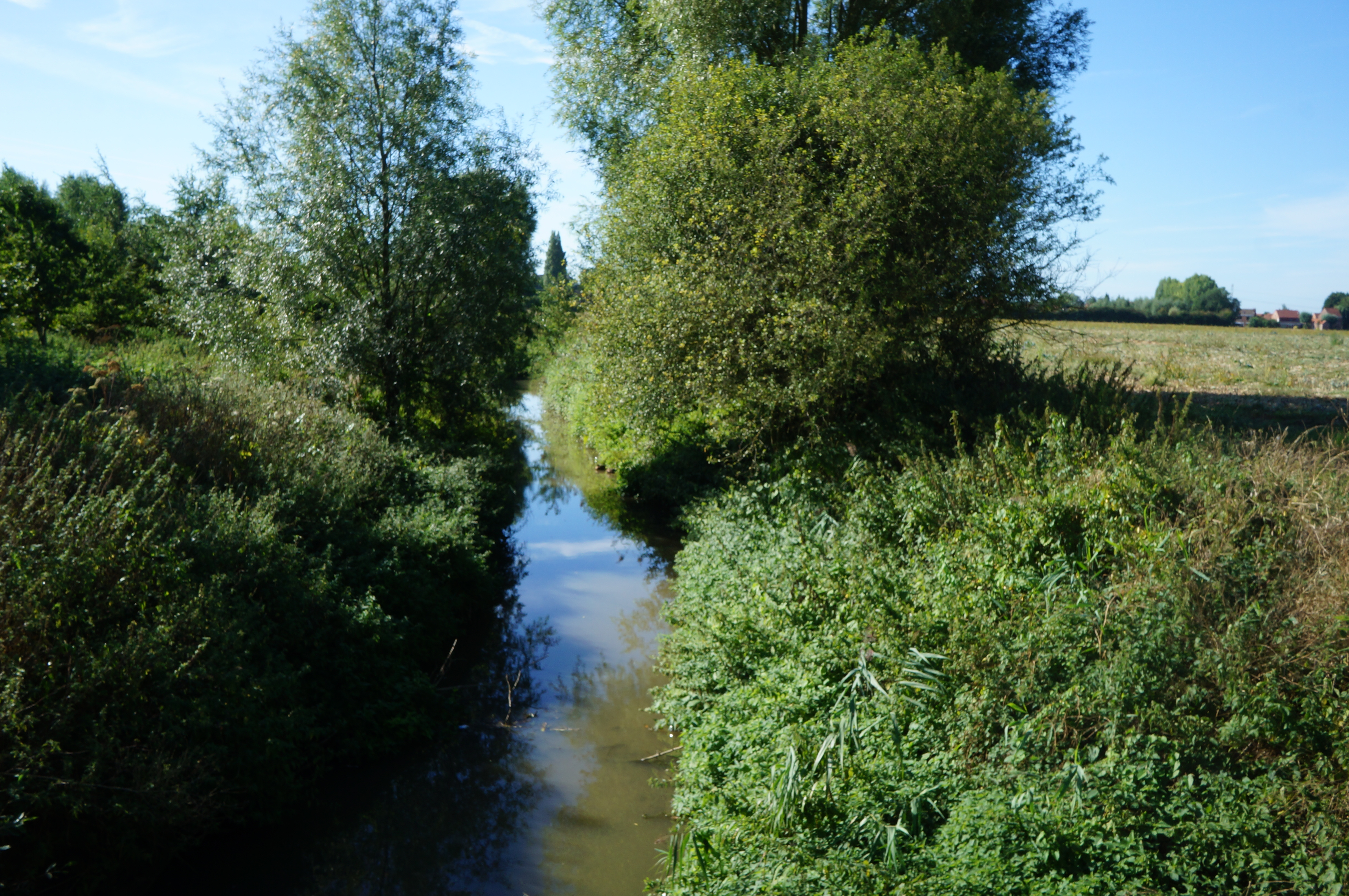 A la jonction des ruisseaux Biestel et Kirlem sur le chemin du Pont de Pierre Becque à Steenwerck, Nord.- France.